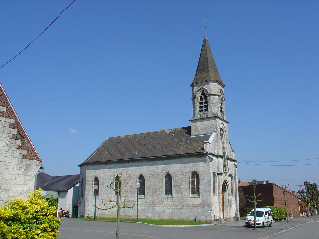 Église d'Haute-Avesnes